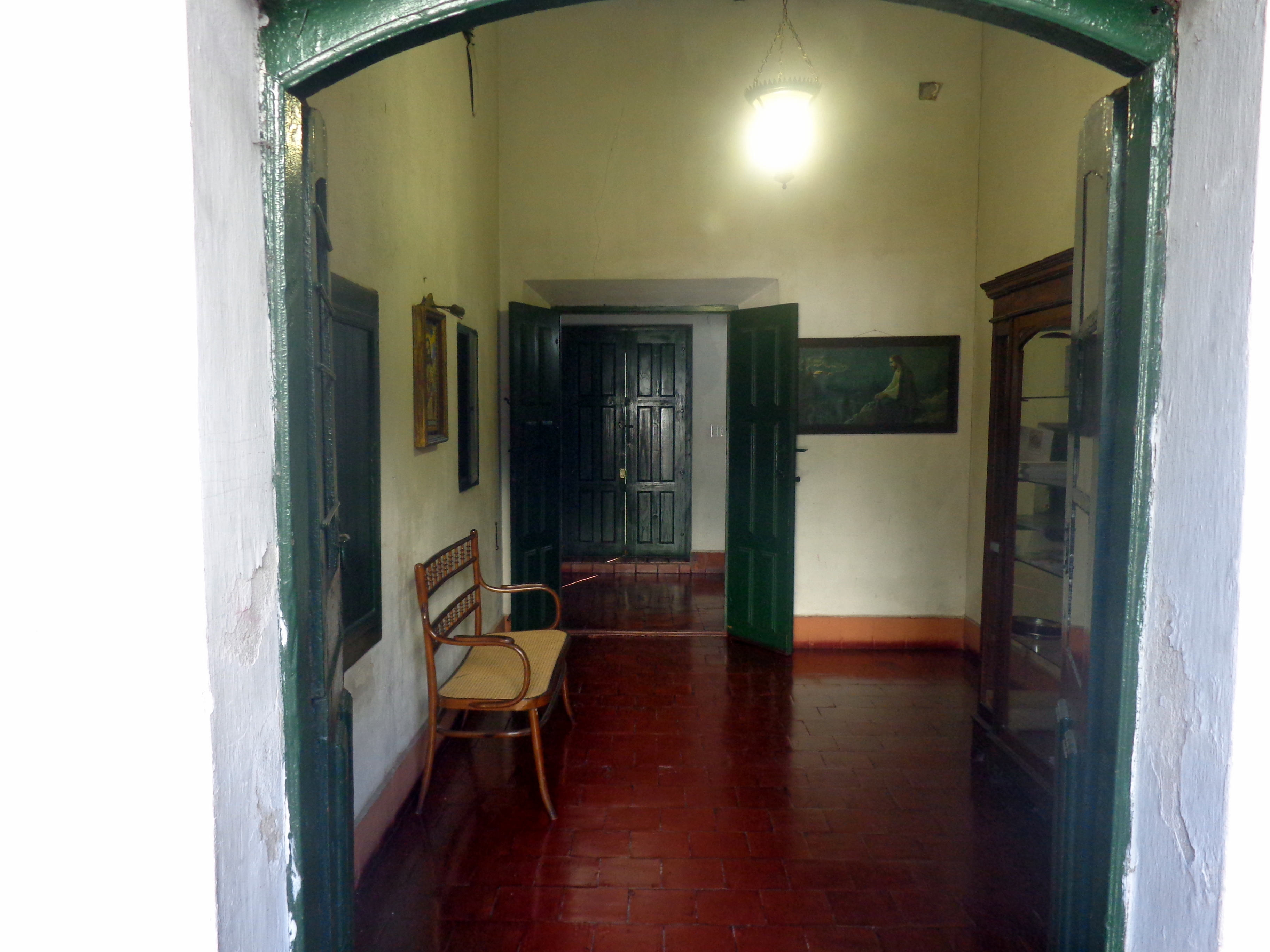 El Museo de la Santa Casa de Ejercicios Espirituales San Ignacio de Loyola, de Sor María Antonia de la Paz y Figueroa, se halla en Avenida Independencia 1190, Constitución, Ciudad de Buenos Aires, Argentina.